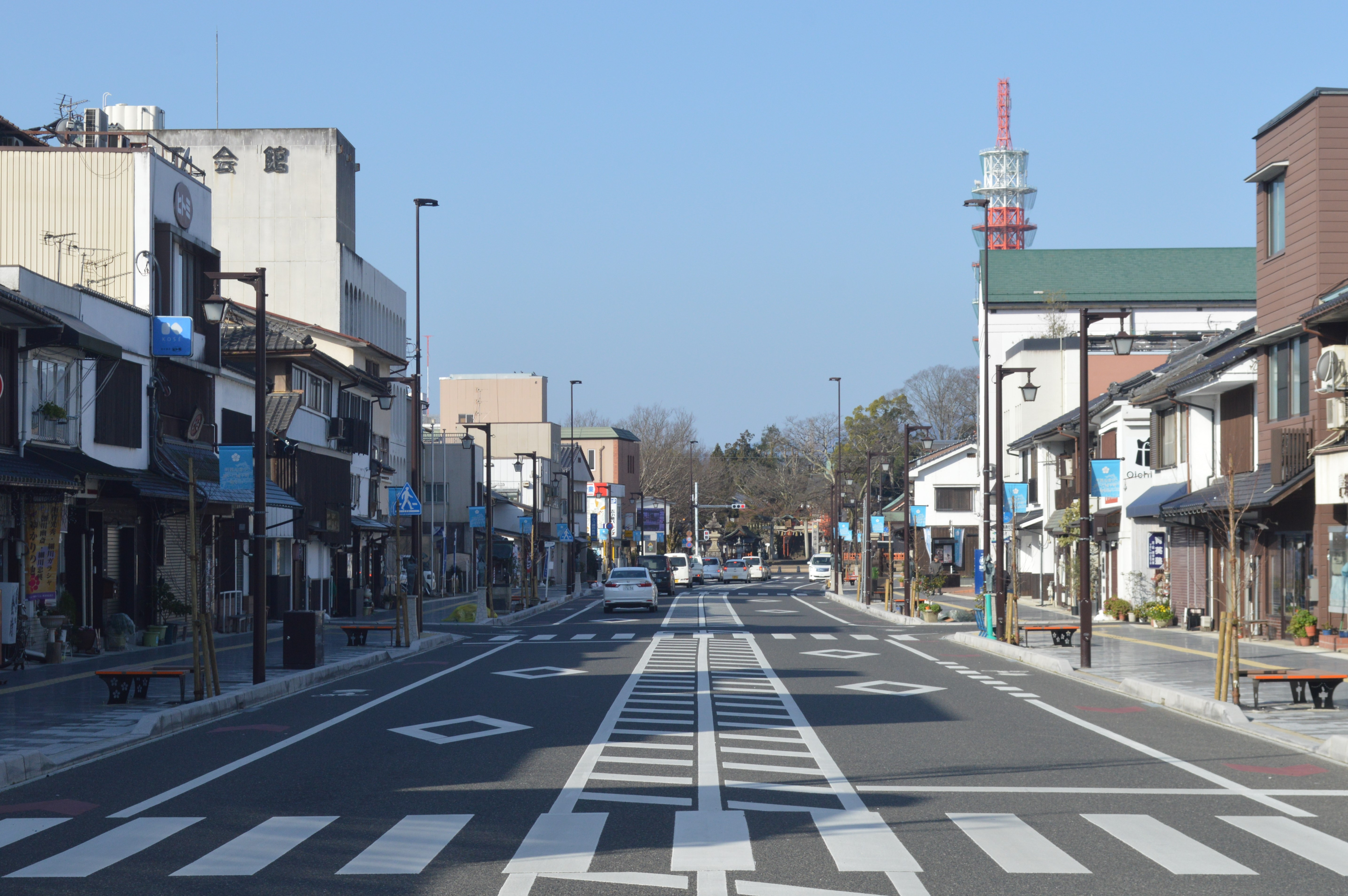 京都府福知山市にある広小路。